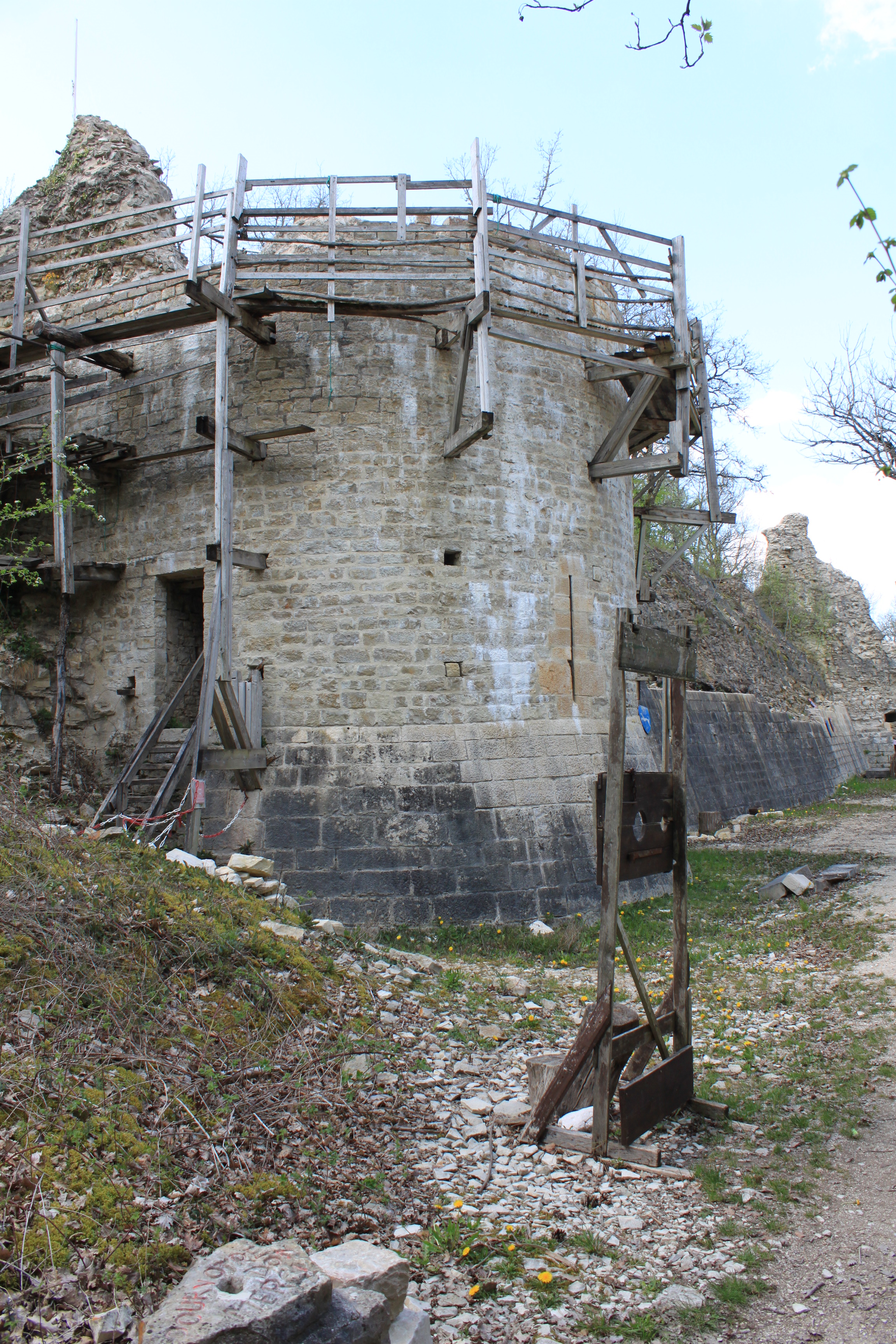 Noyers, Yonne, Bourgogne, France